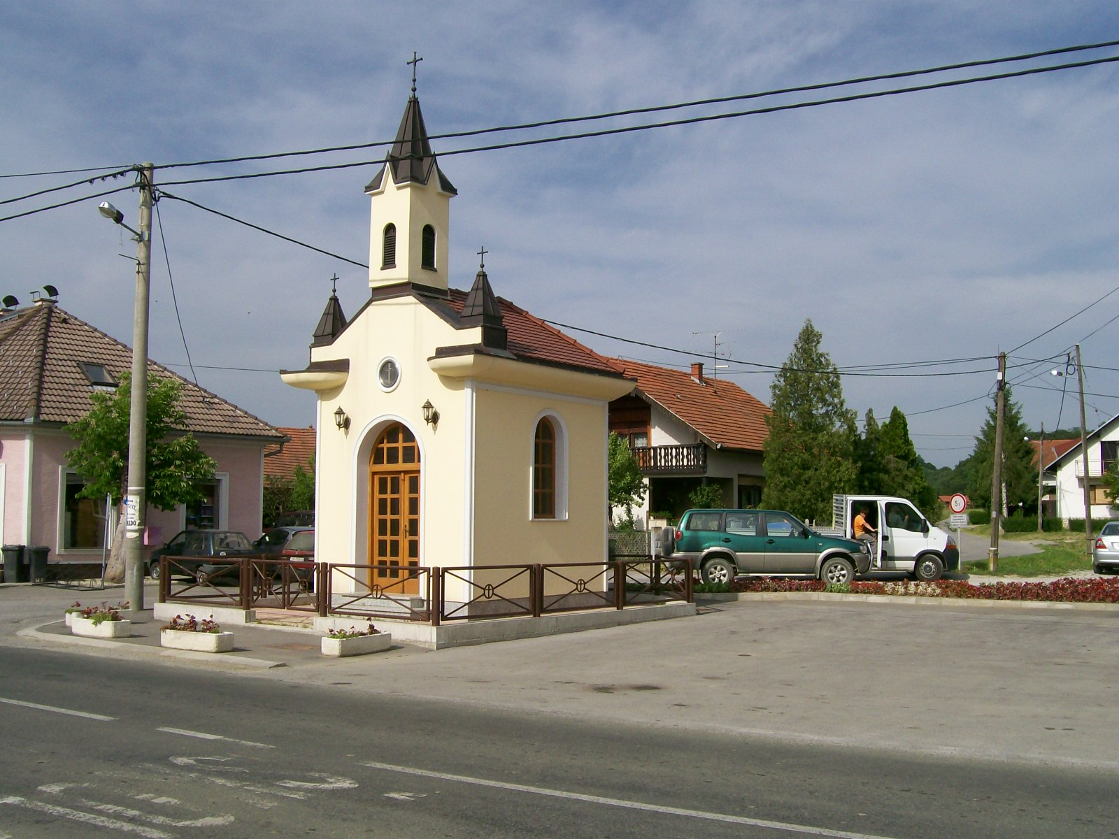 Kapelica u središtu Kraljevca na Sutli